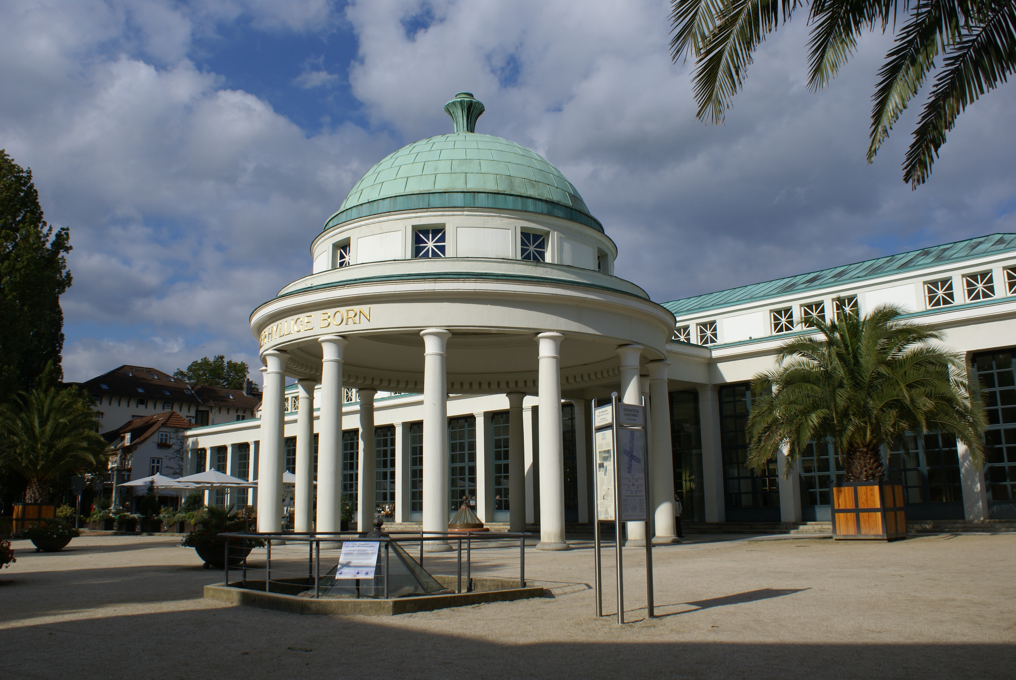 Der Hyllige Born in Bad Pyrmont